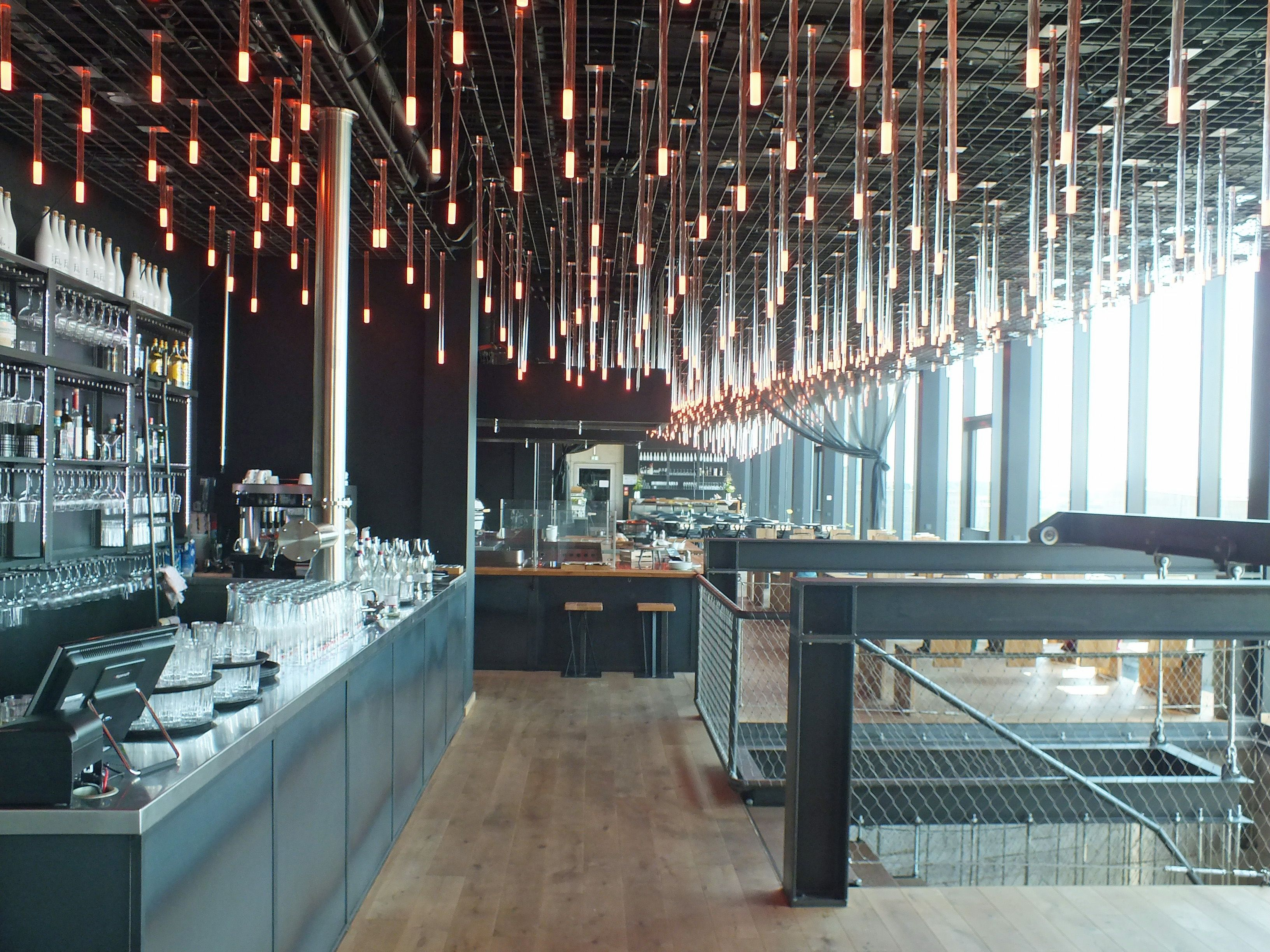 Restaurant „Felix“ im aufgesetzten 7. Stock der ehemaligen Hauptpost in Leipzig